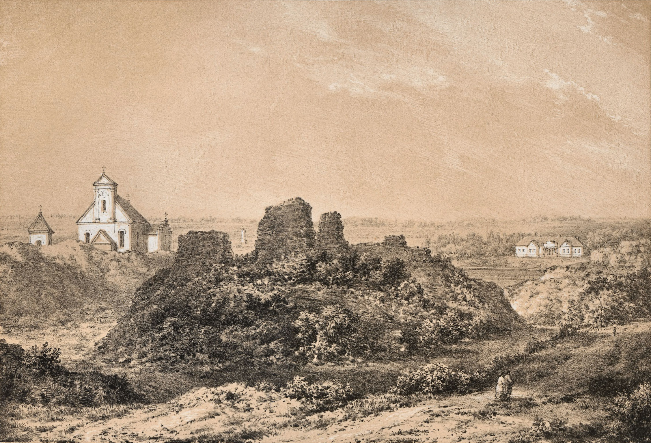 Беларуская (тарашкевіца): Геранёны (Gieraniony). Руіны замка Гаштольдаў